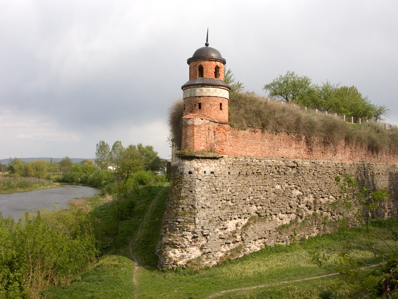 Castle in Dubno, Ukraine / Замок, Дубно